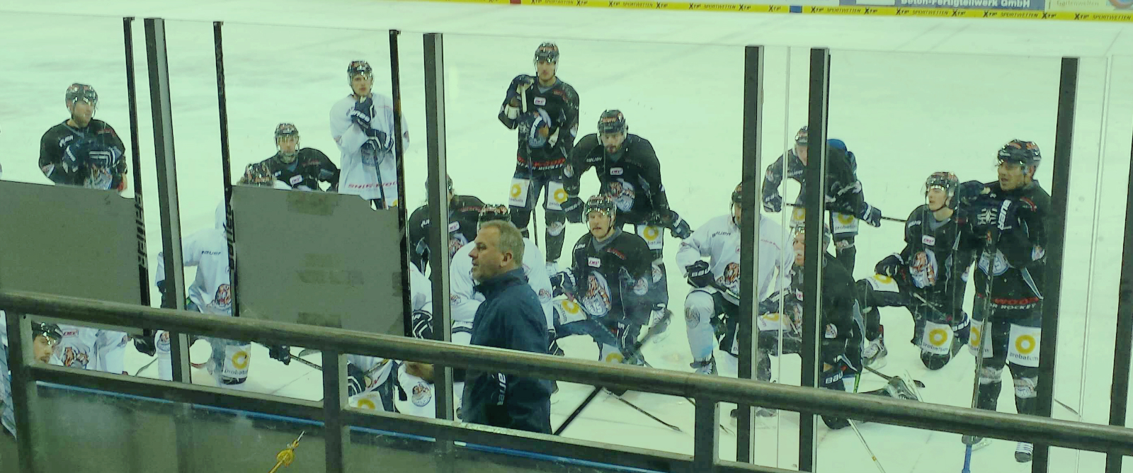 Rob Wilson beim Training der Straubing Tigers